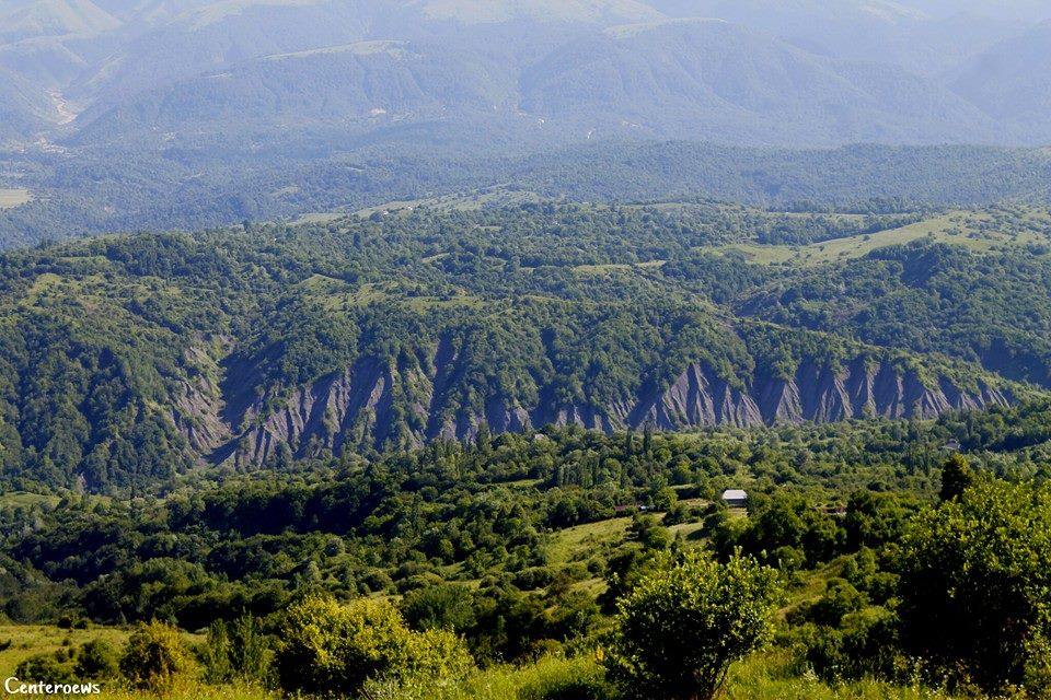 Селение Центарой